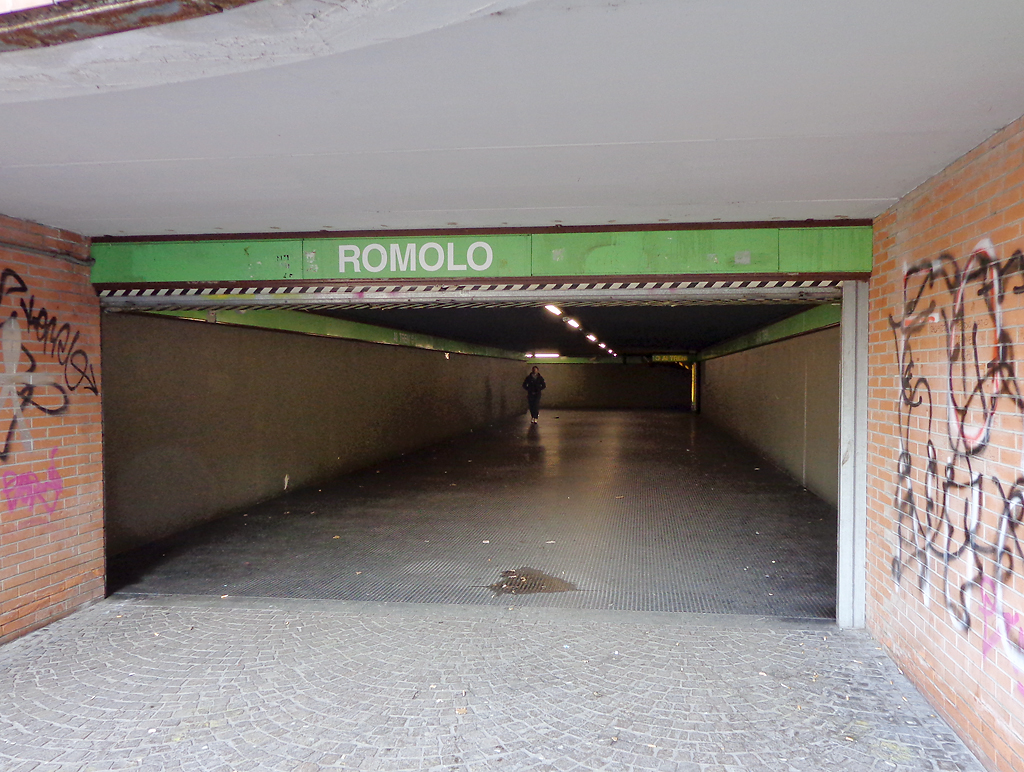 Stazione di Romolo della metropolitana di Milano, il nuovo ingresso dal lato sud.